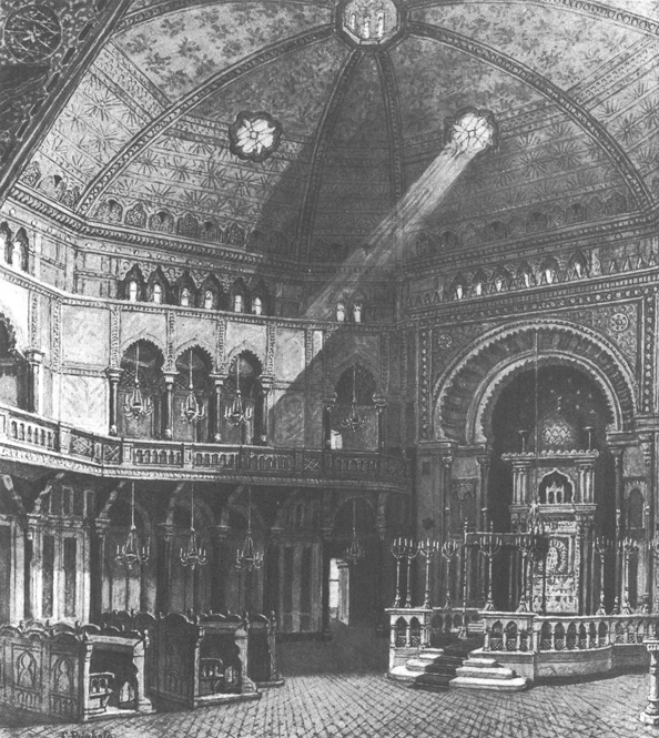 Synagoge Zirkusgasse (Wien Leopoldstadt) innen, nach einem Aquarell von Franz Xaver Reinhold